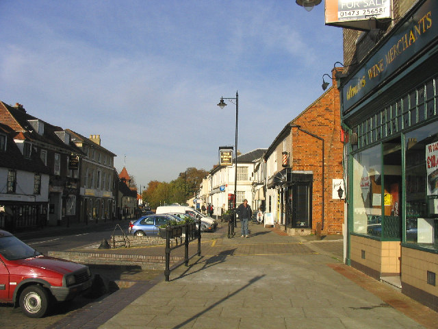 Chipping Ongar, Essex